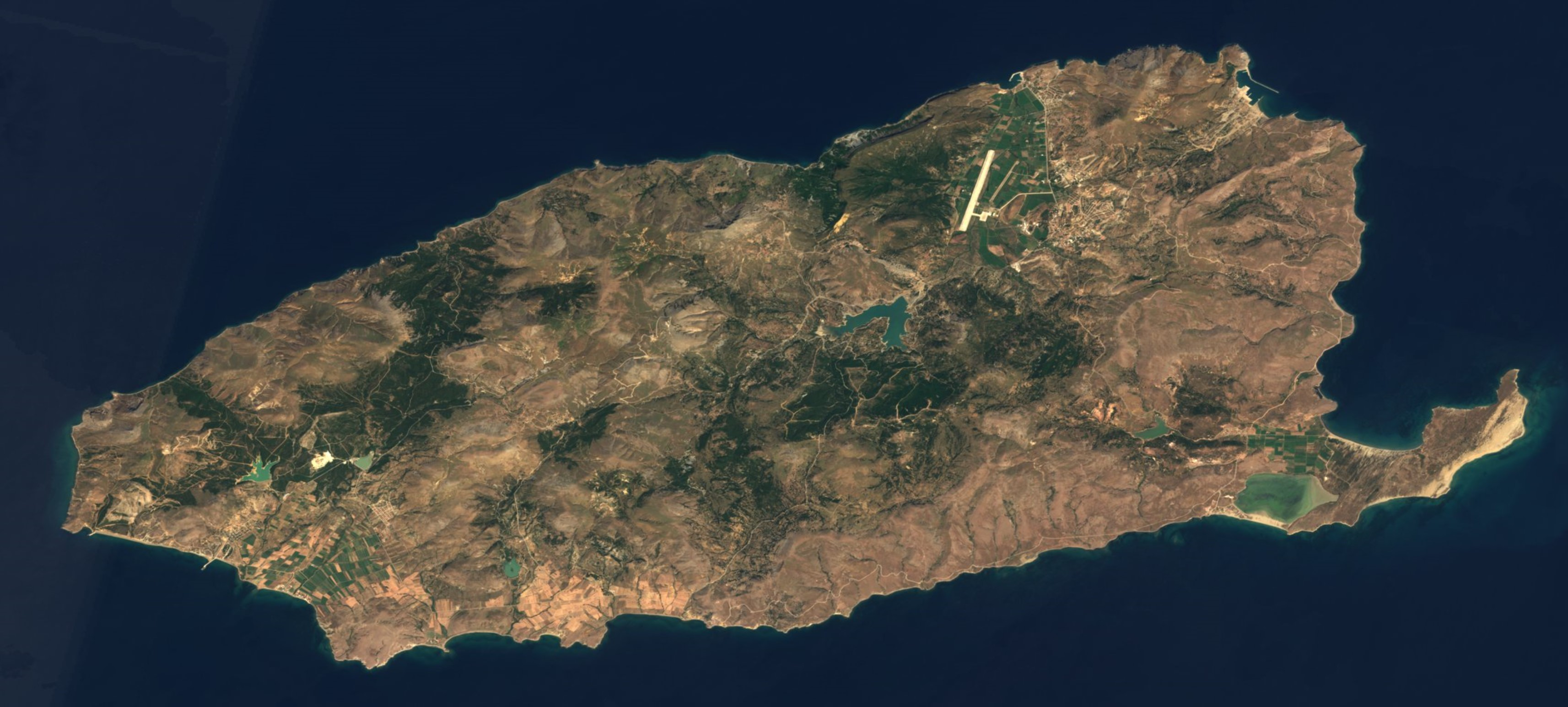 Gökçeada (Satellitenbild)